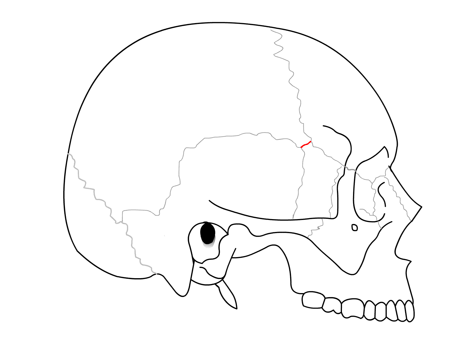 Sphenoparietal suture